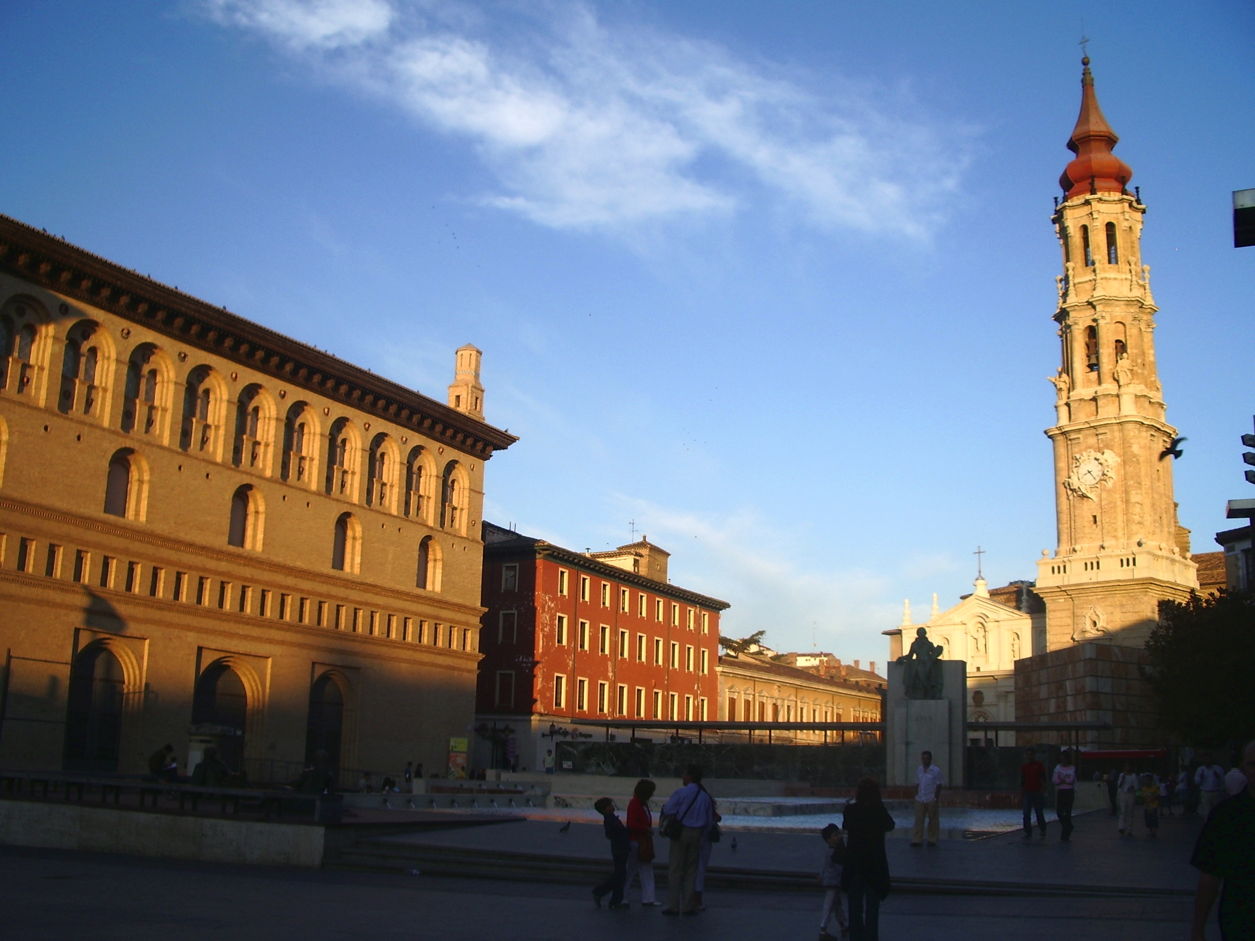 Plaza de las catedrales de Zaragoza